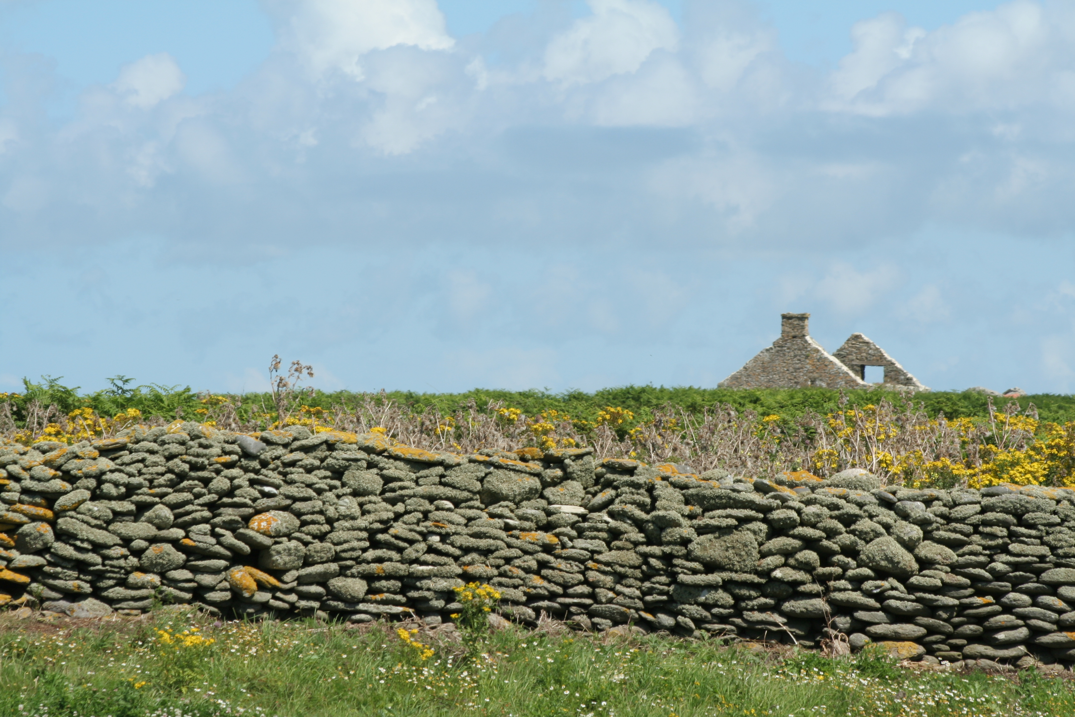 Mur sur l'île de Trielen